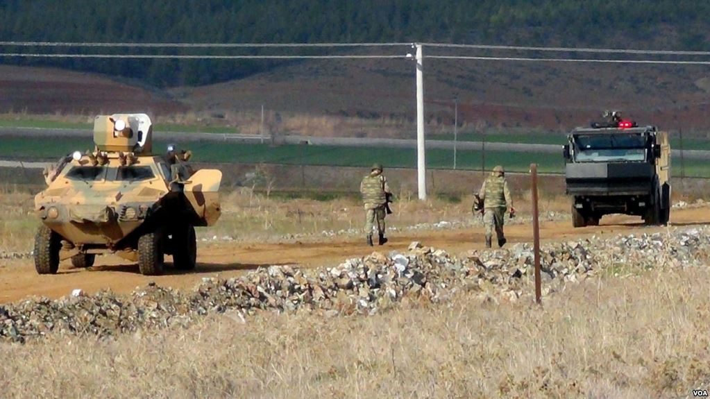 Suriye’den Türkiye’ye Kınama